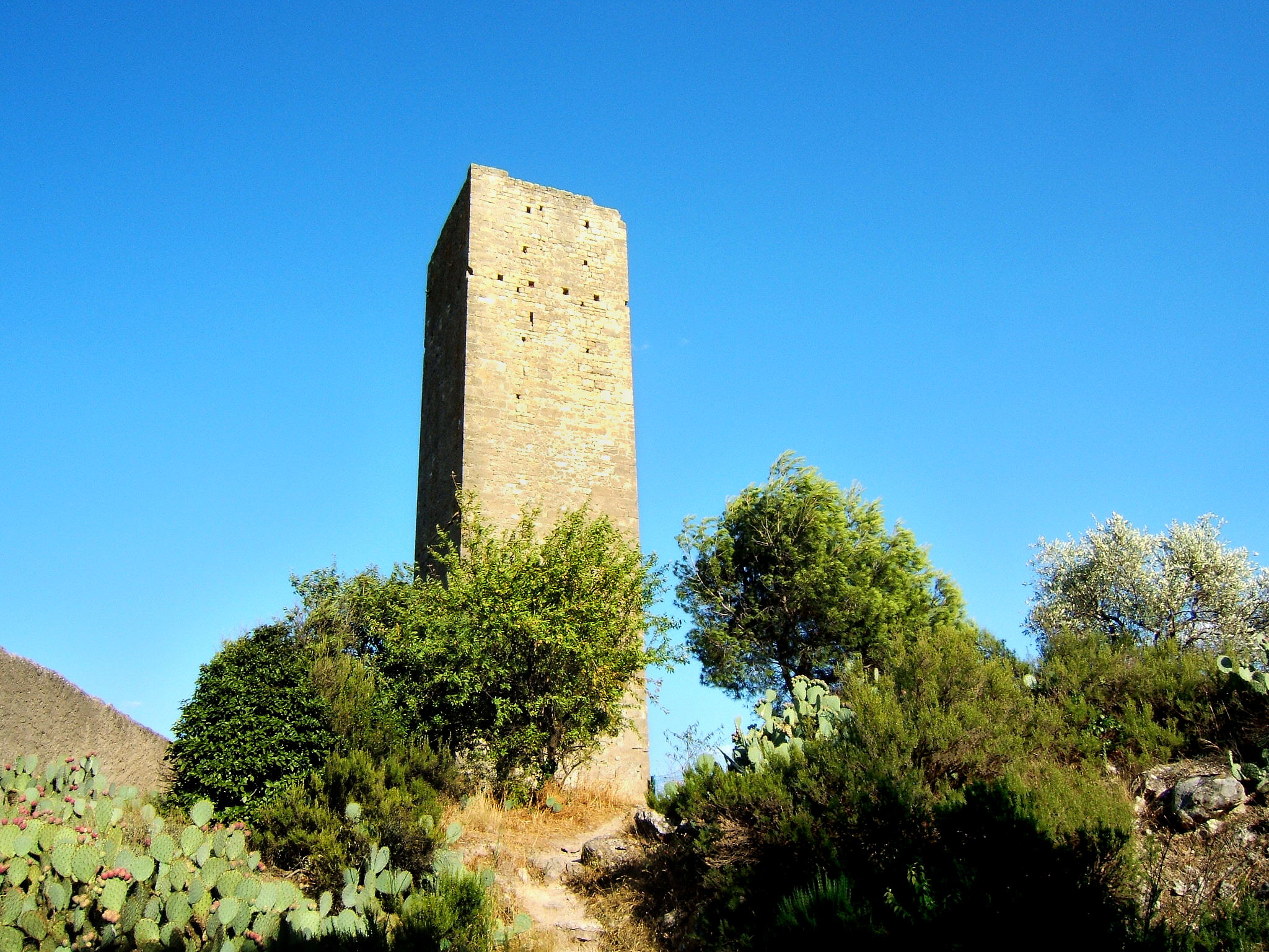 Tour de Montady (Hérault)